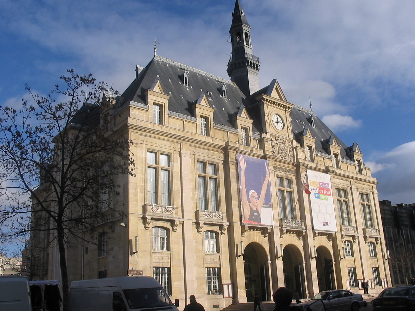 Mairie de Saint-Denis (93). Bâtiment construit entre 1878 et 1883 sur les palns de Laynaud, architecte municipal. les aménagements furent menés jusqu'en 1889 par l'architecte Cailleux. Ce bâtiment se trouve sensiblement à l'emplacement du premiers "orps de ville" de Saint-Denis, loué par l'Assemblée du Bailliage de Saint-Denis en 1733. Je suis l'auteur du cliché pris en 2005 Licensing Catégorie:Saint-Denis (Seine-Saint-Denis)